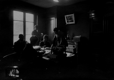 Bureaux de l'entreprise Gattefossé, rue Camille, Lyon, 1919.